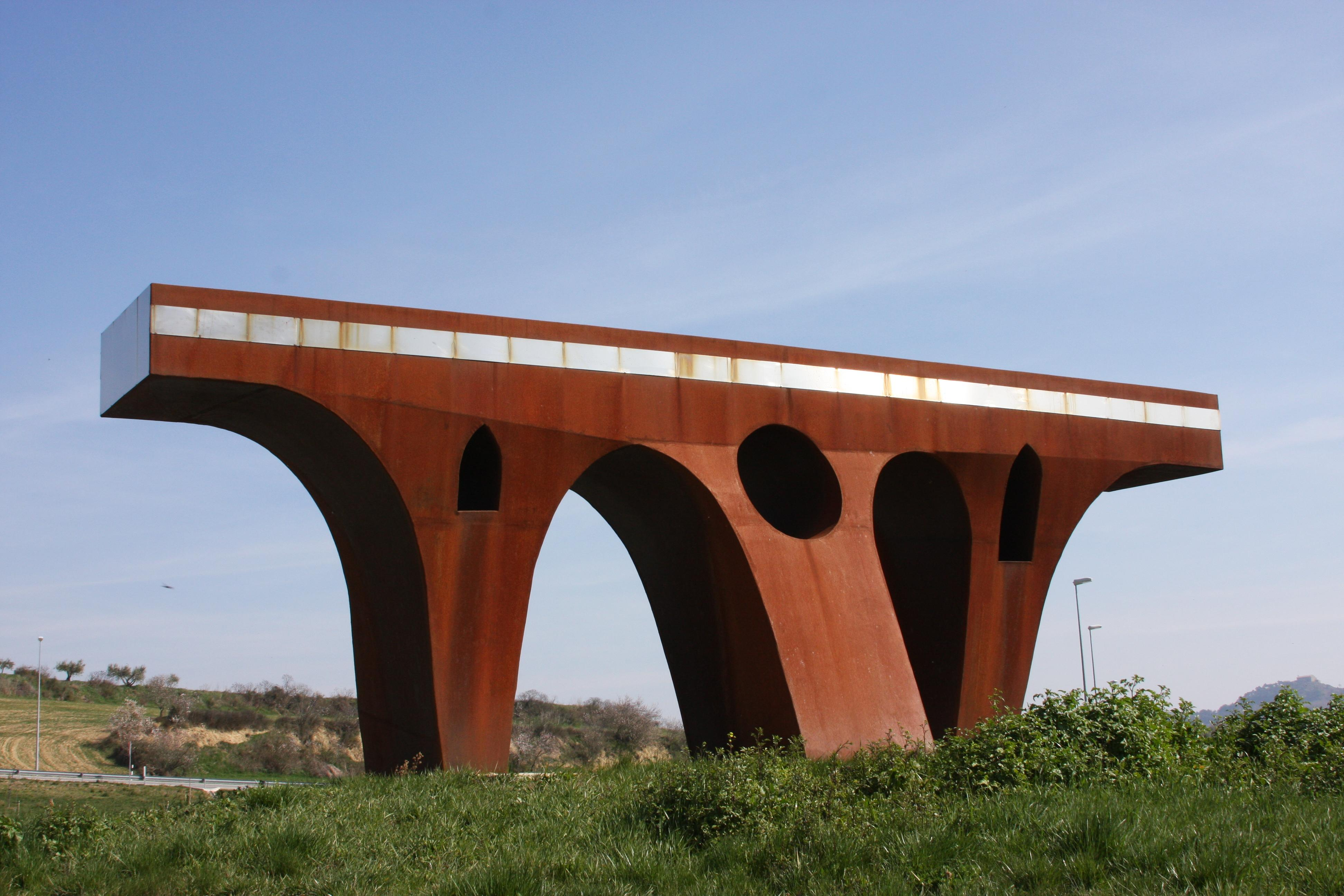 Puente Paso de Europa